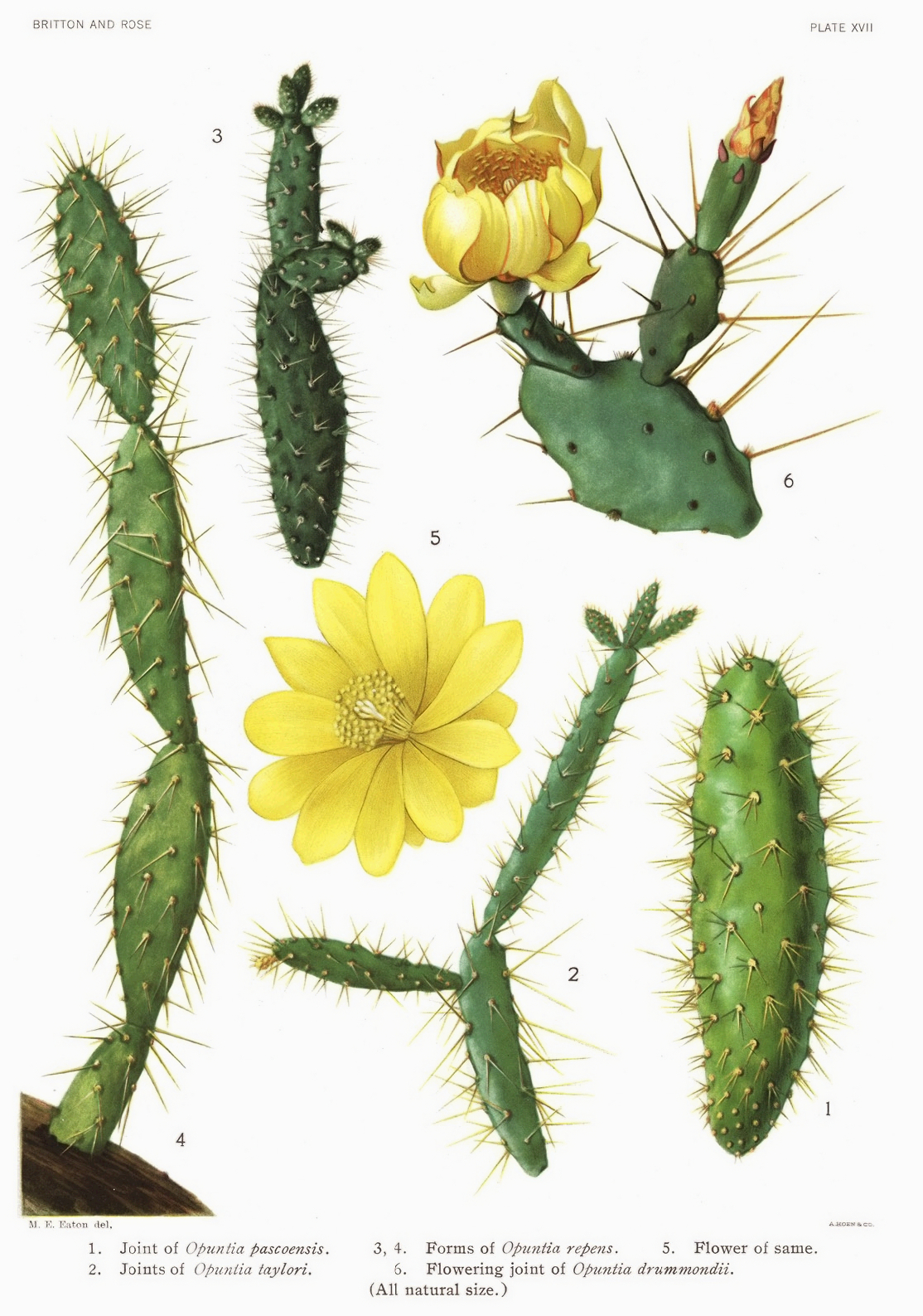 1. Opuntia pubescens, 2. Opuntia taylori , 3, 4, 5. Opuntia repens, 6. Opuntia pusilla.